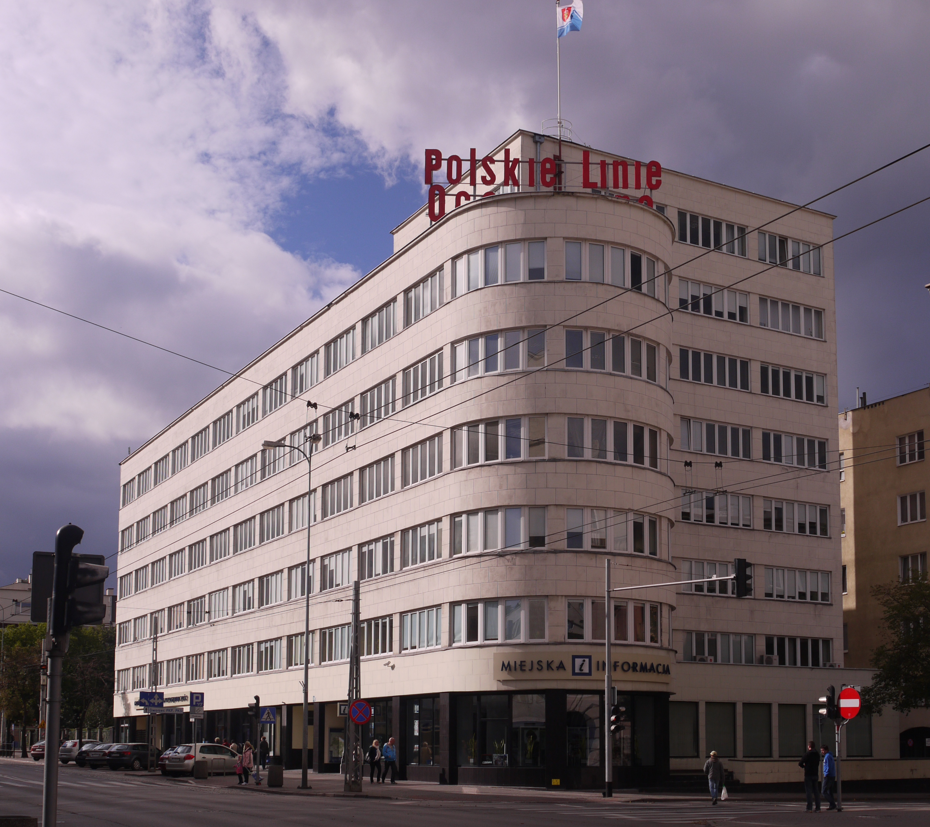 Gdynia Śródmieście, ul. 10 Lutego 24 - Siedziba Zakładu Ubezpieczeń i PLO ("Polskie Linie Oceaniczne")